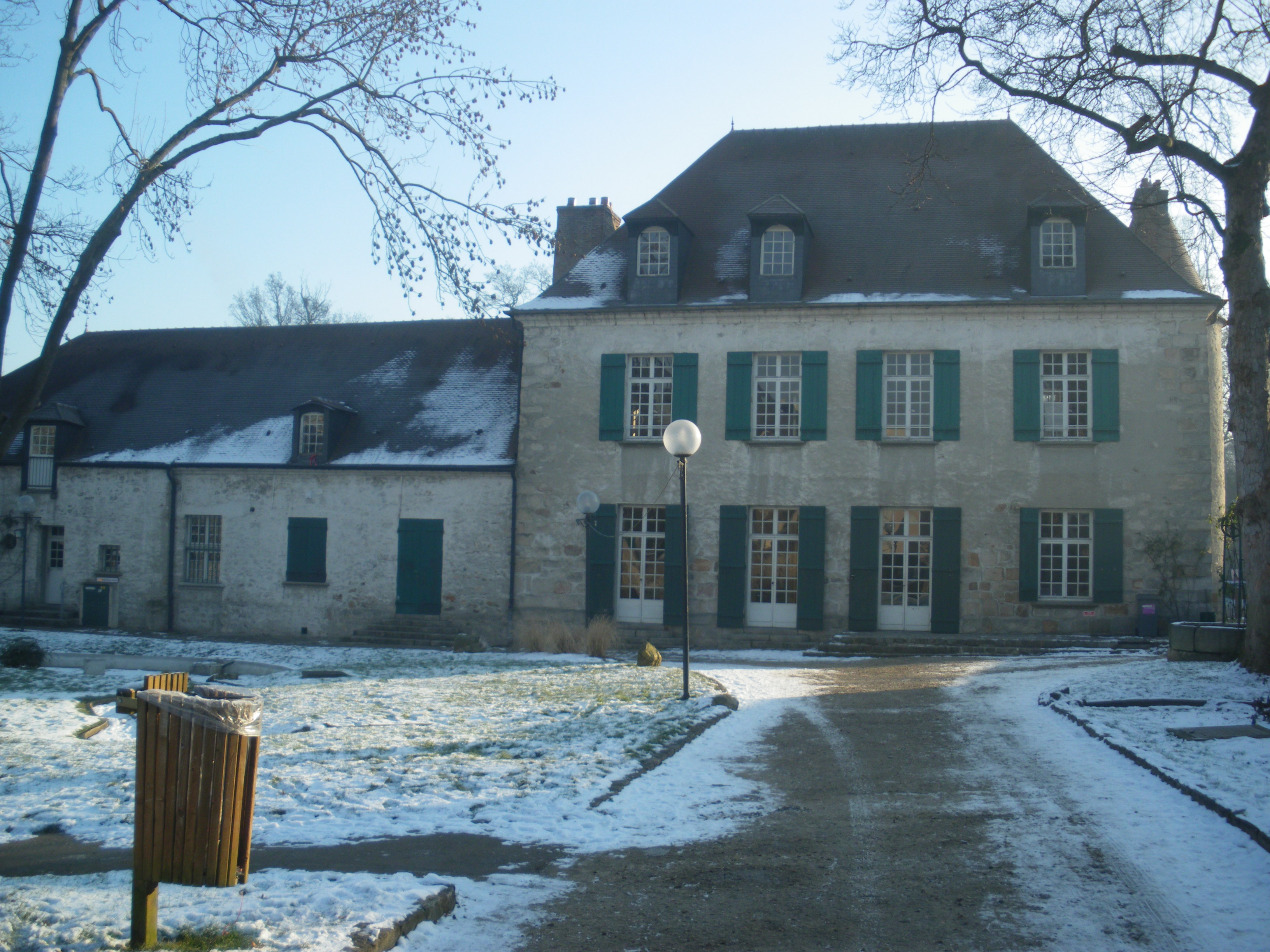 Salle de la Bouvêche à Orsay (Essonne, Île-de-France, France).